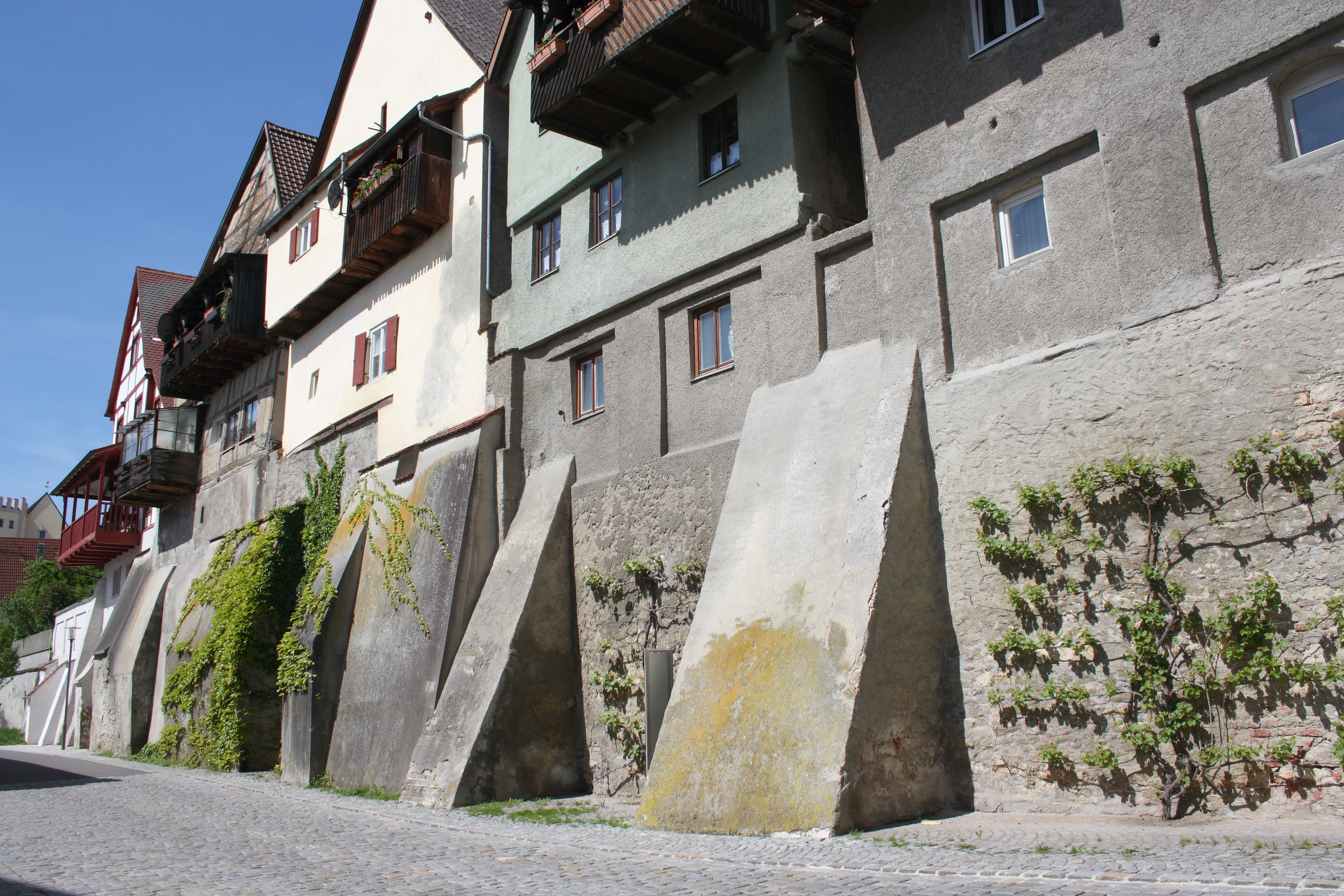 Häuser der Schloßstraße vom Oberes Brunnental aus gesehen, in Lauingen im Landkreis Dillingen an der Donau (Bayern)